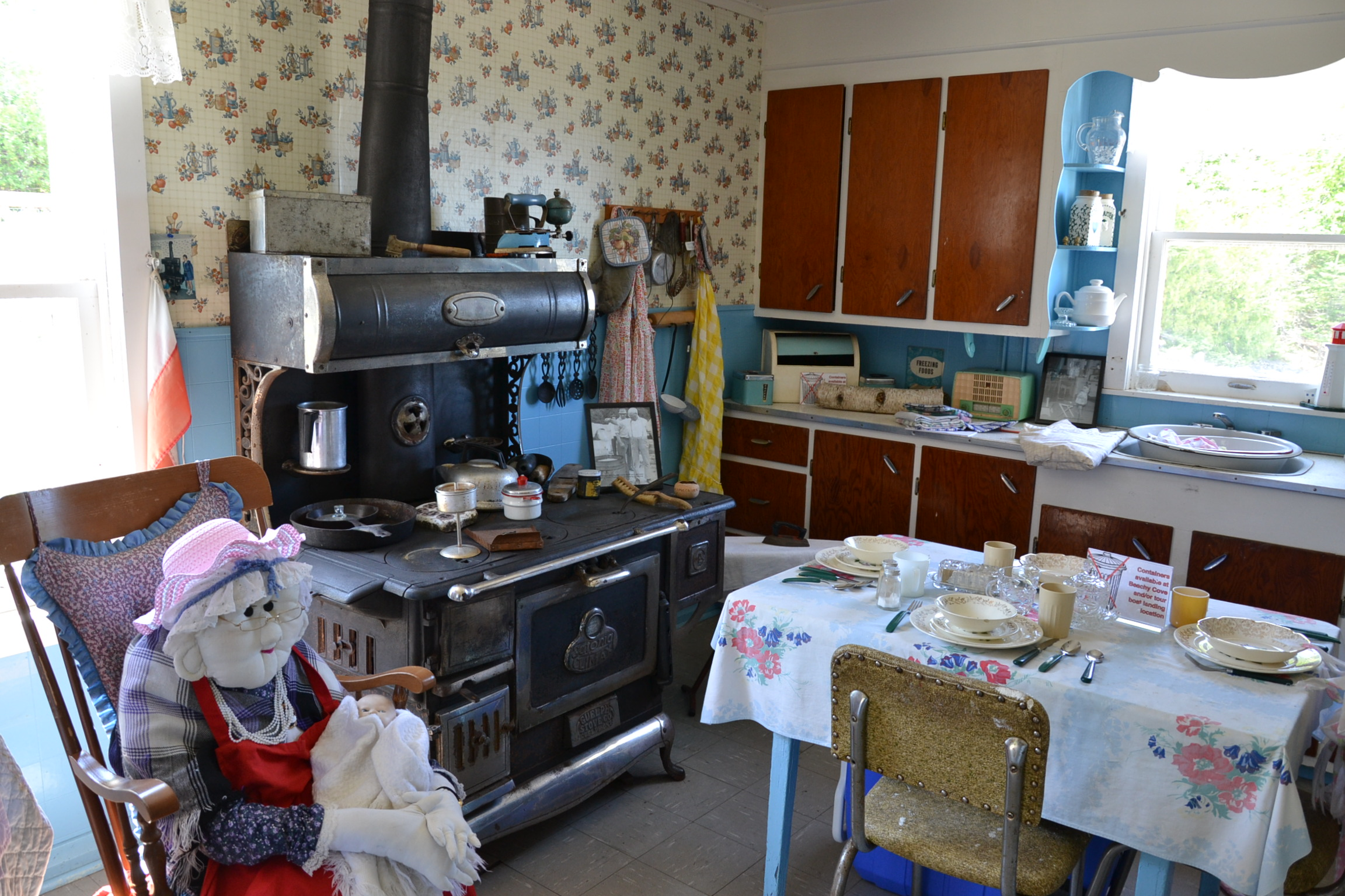 Flowerpot Island - lightkeepers' house (inner exposition - kitchen)